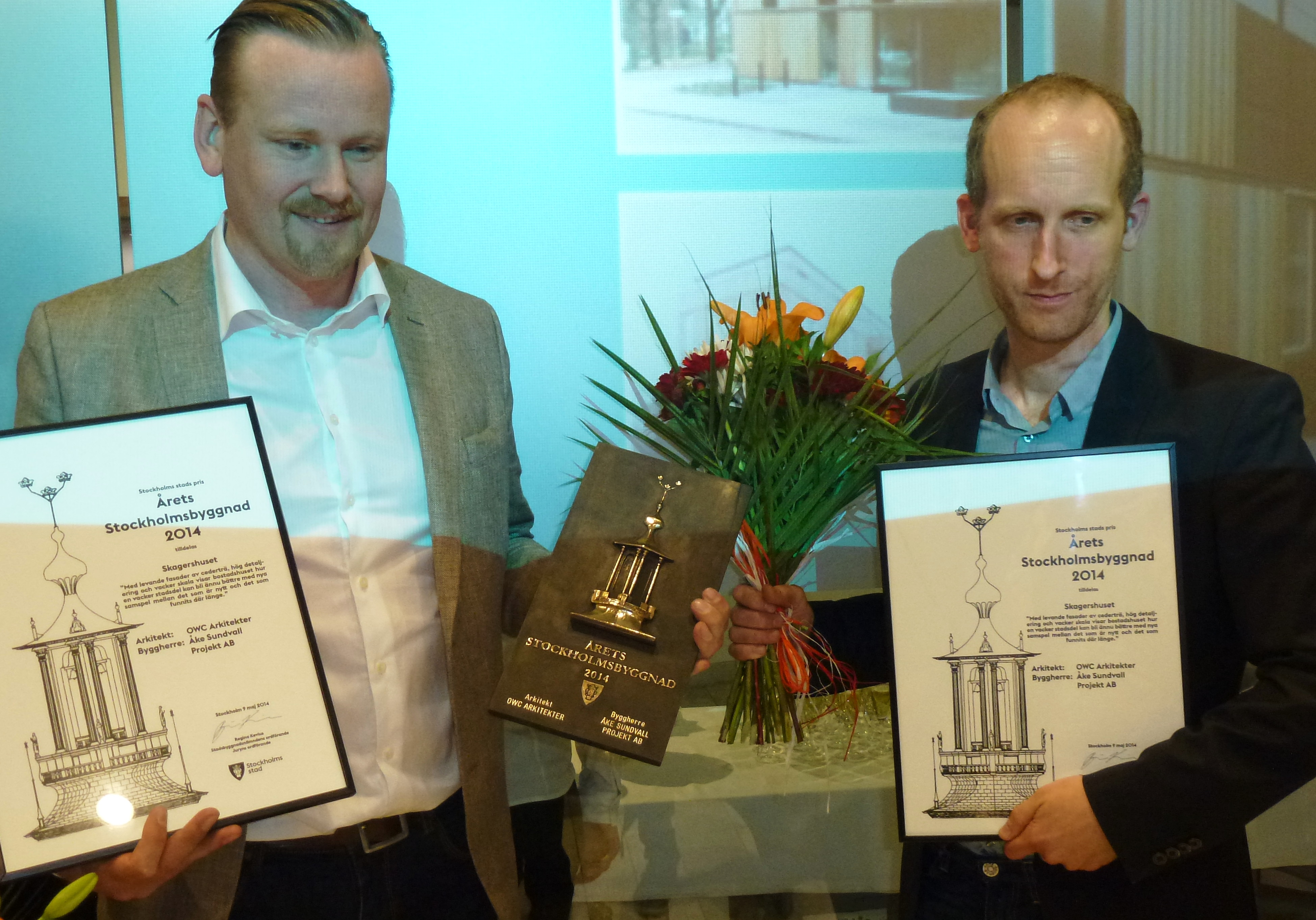 Årets Stockholmsbyggnad 2014 blev Skagershuset i Årsta. Johan Lins (t.v.), ansvarig för projektutveckling på Åke Sundvall Projekt AB och Björn Ahrenby, arkitekt OWC tog emot diplomen och plakett.